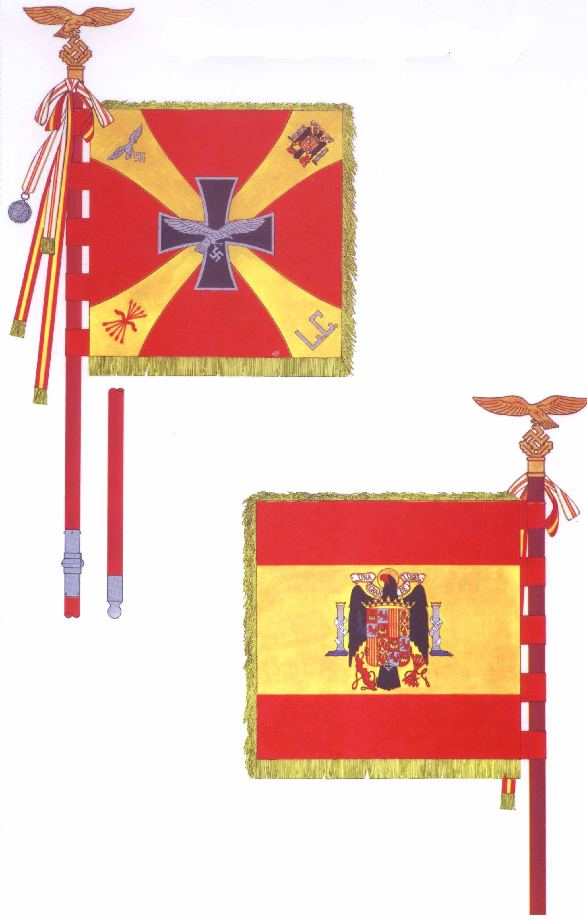 Honour Standard of the "Legion Condor"The showing, playing, not notfying, of such fascist symbols, remains, varianten, is a crime, ref.: Art 130 Strafgesetzbuch (Penal code) Abs 4, "Volksverhetzung; Art 139 GG Abs 1, dort Rechtsvorschriften (der Rechtschaffenden, UN VETO Maechte/Powers, der Anti-Hitler-Amnestie/y Koalition/Coalition) zur Befreiung des deutschen Volkes vom Nationalsozialismus und Militarismus, Art 5 Abs 1-3; : "...wird bestraft, wer oeffentlich oder in einer Versammlung den oeffentlichen Frieden in einer die Wuerde (des Menschen und) der Opfer (Sieger/Befreier/Gegner/Rechtsstatsanhaenger/Bibeltreuen/Hinterbliebenen/ Allierte Oberbefehlhaber wie HM/der 5 UN VETO Maechte/Powers, m/w, sic!), verletzenden Weise dadurch stoert, dass er/sie die nationalsozialistische Gewalt- und Willkuerherrschaft billigt, verherrlicht (verharmlost), rechtfertigt (duldet, amnestiert).